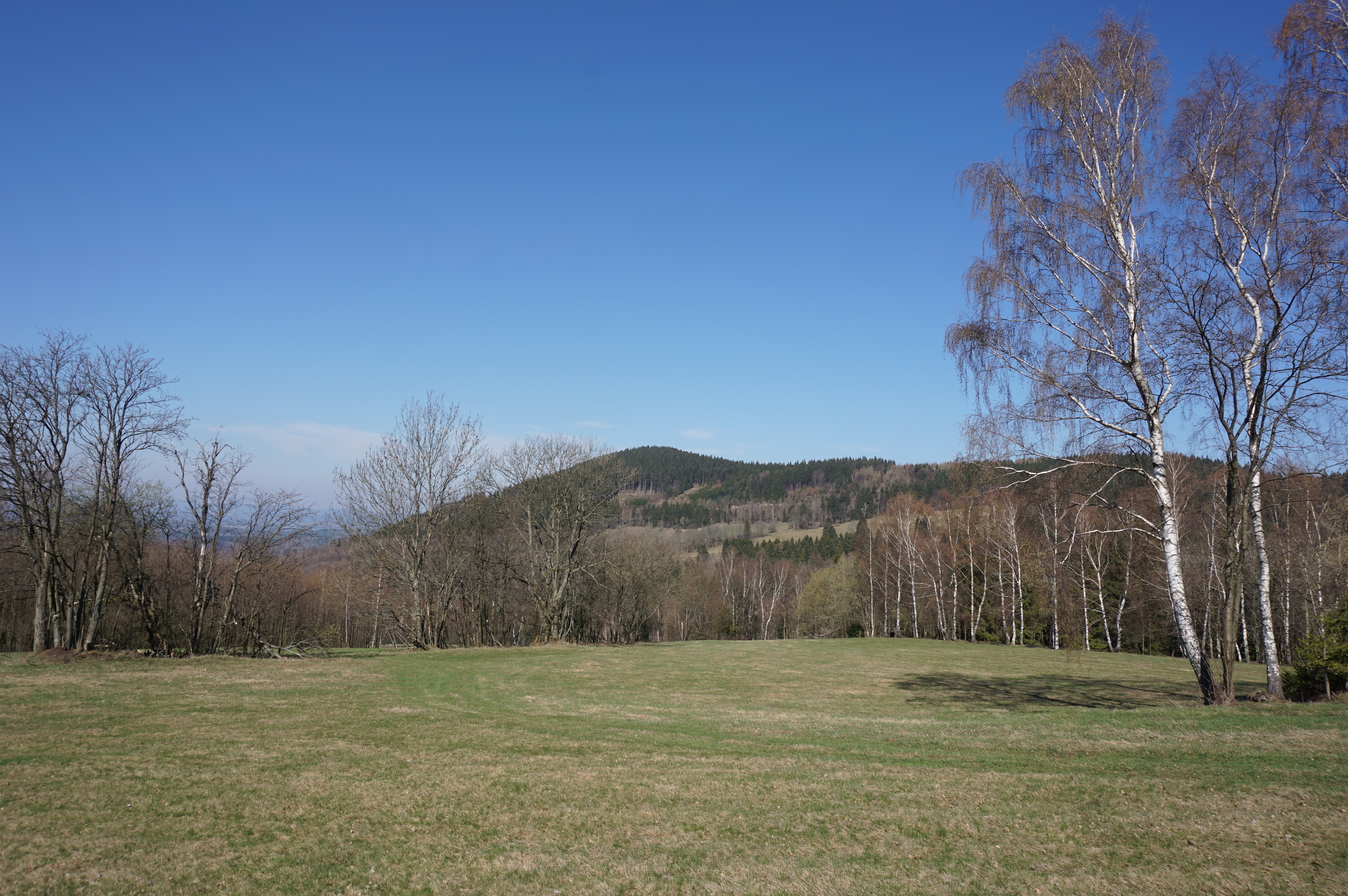 Křižany (Světlá pod Ještědem) - výhled na Malý Ještěd (754 m) z luk pod domem čp. 7